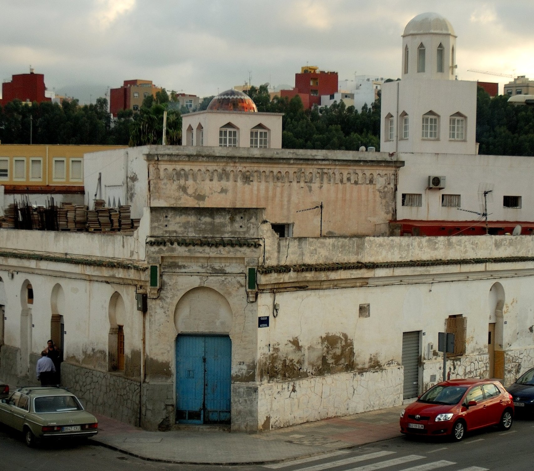 Recorrido por los rincones de Melilla, 16 de octubre del 2009. Con filtro ND.